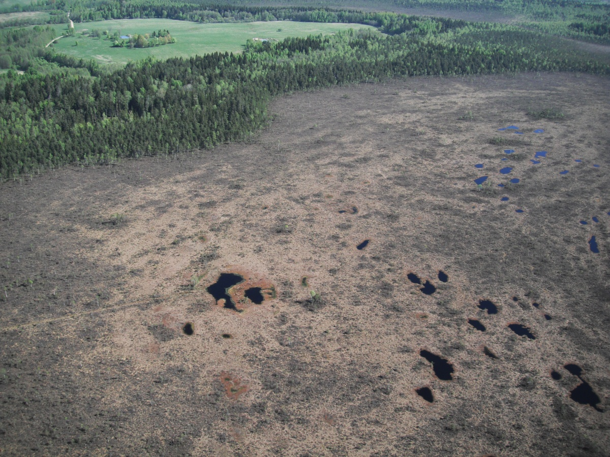 Reiskių tyro akivarai